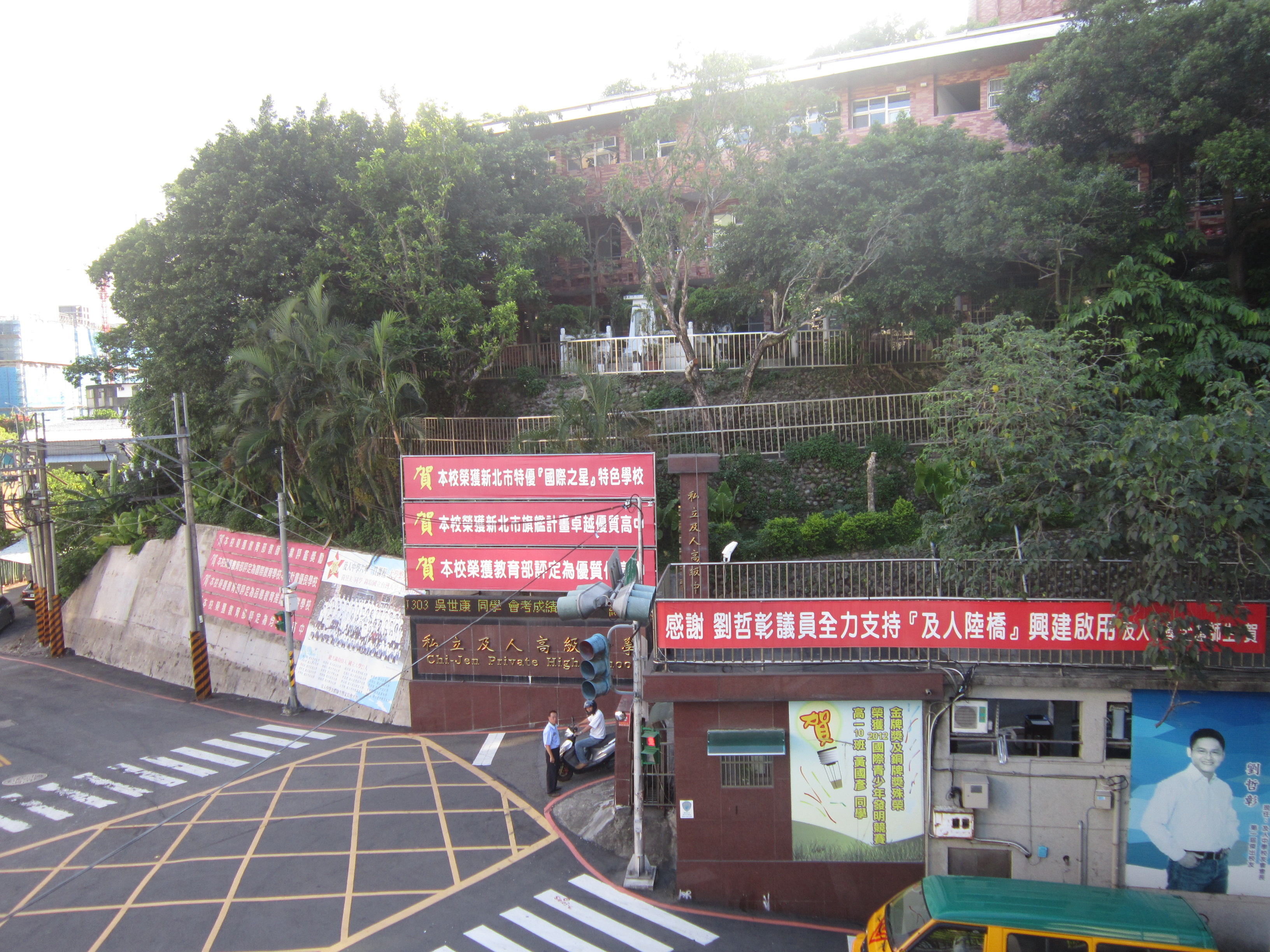 從人行天橋上俯瞰新北市私立及人高級中學。